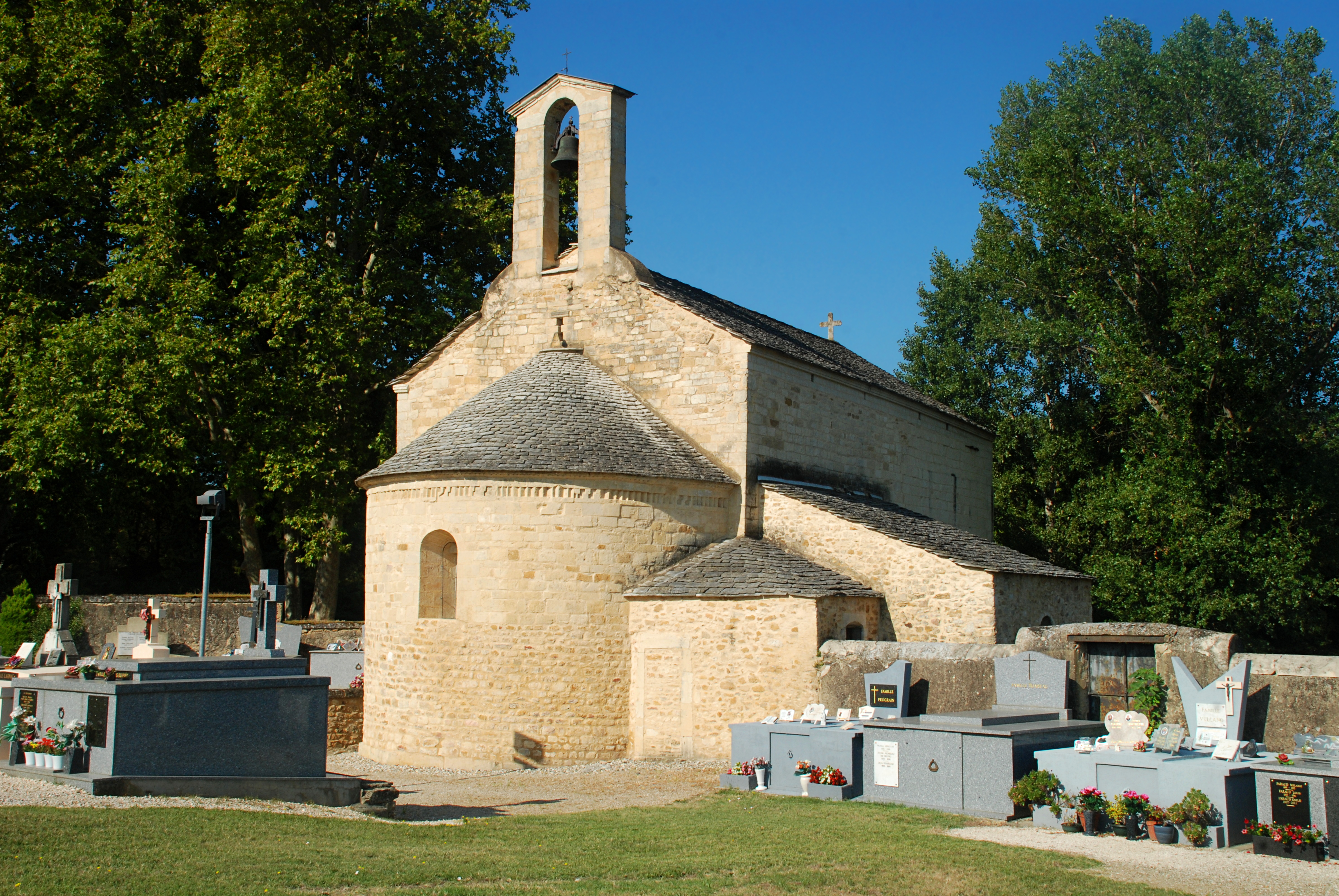 France - Gard - Sabran - Combe - Chapelle Saint-Julien-de-Pistrin